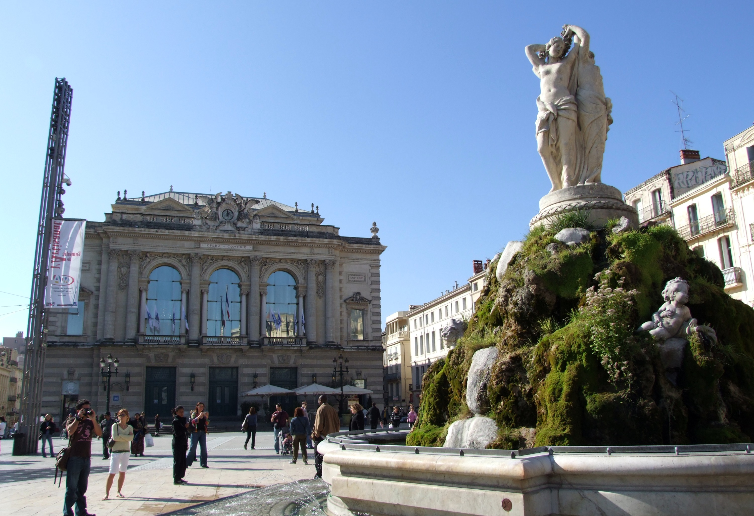 Montpellier, Hérault, FRANCE